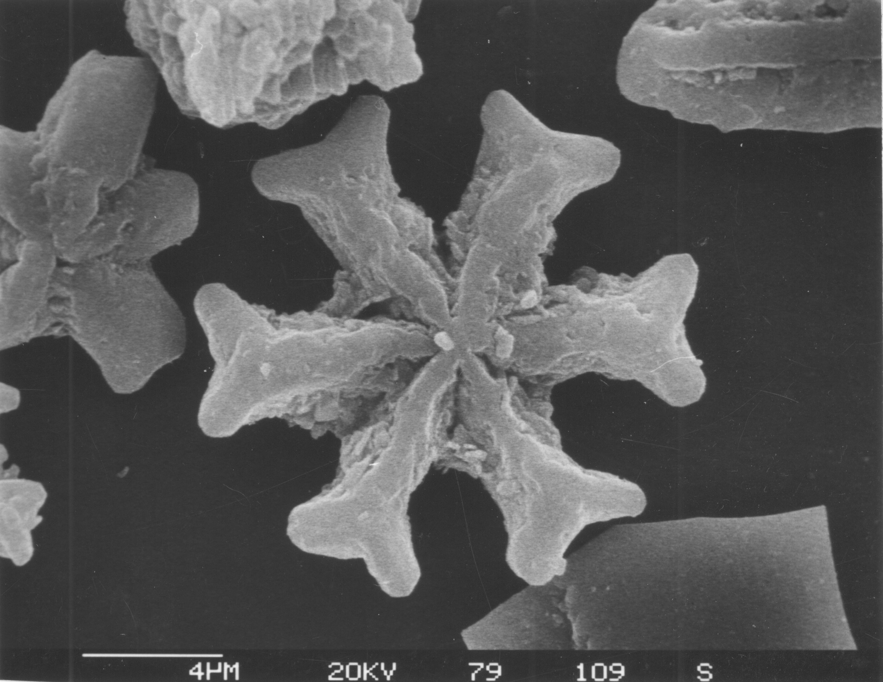 Nannofossil Discoaster surculus